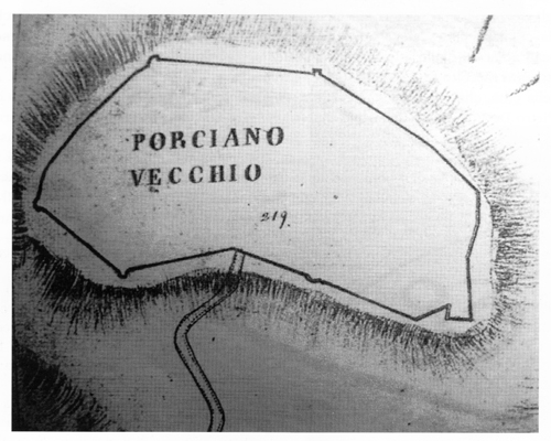 L'andamento del circuito murario del Castrum Porciani nel Catasto Gregoriano